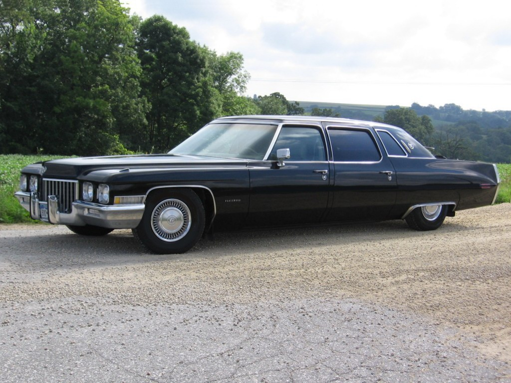 1971 Cadillac Fleetwood 75 (d)